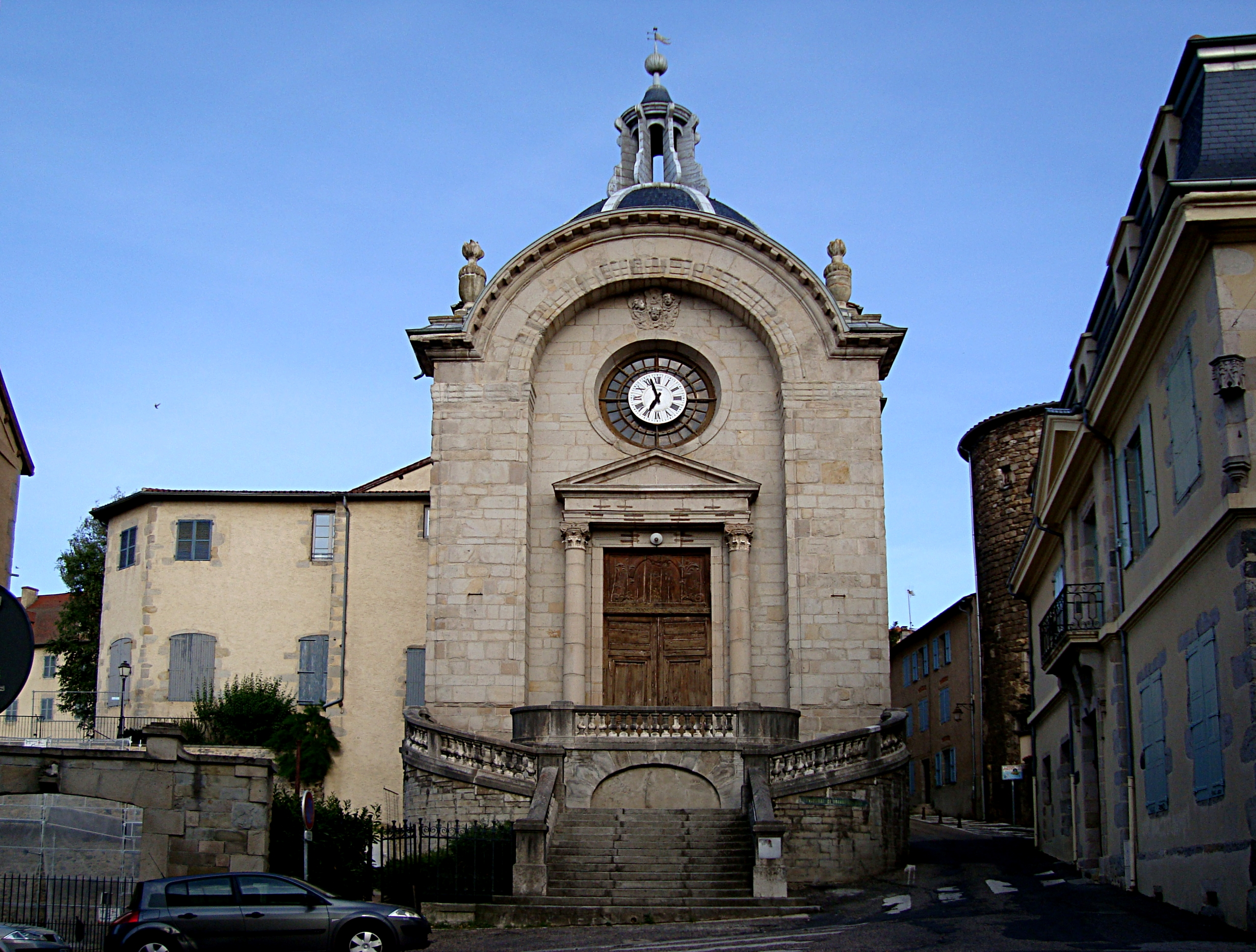 Le palais de justice de Montbrison (Loire).